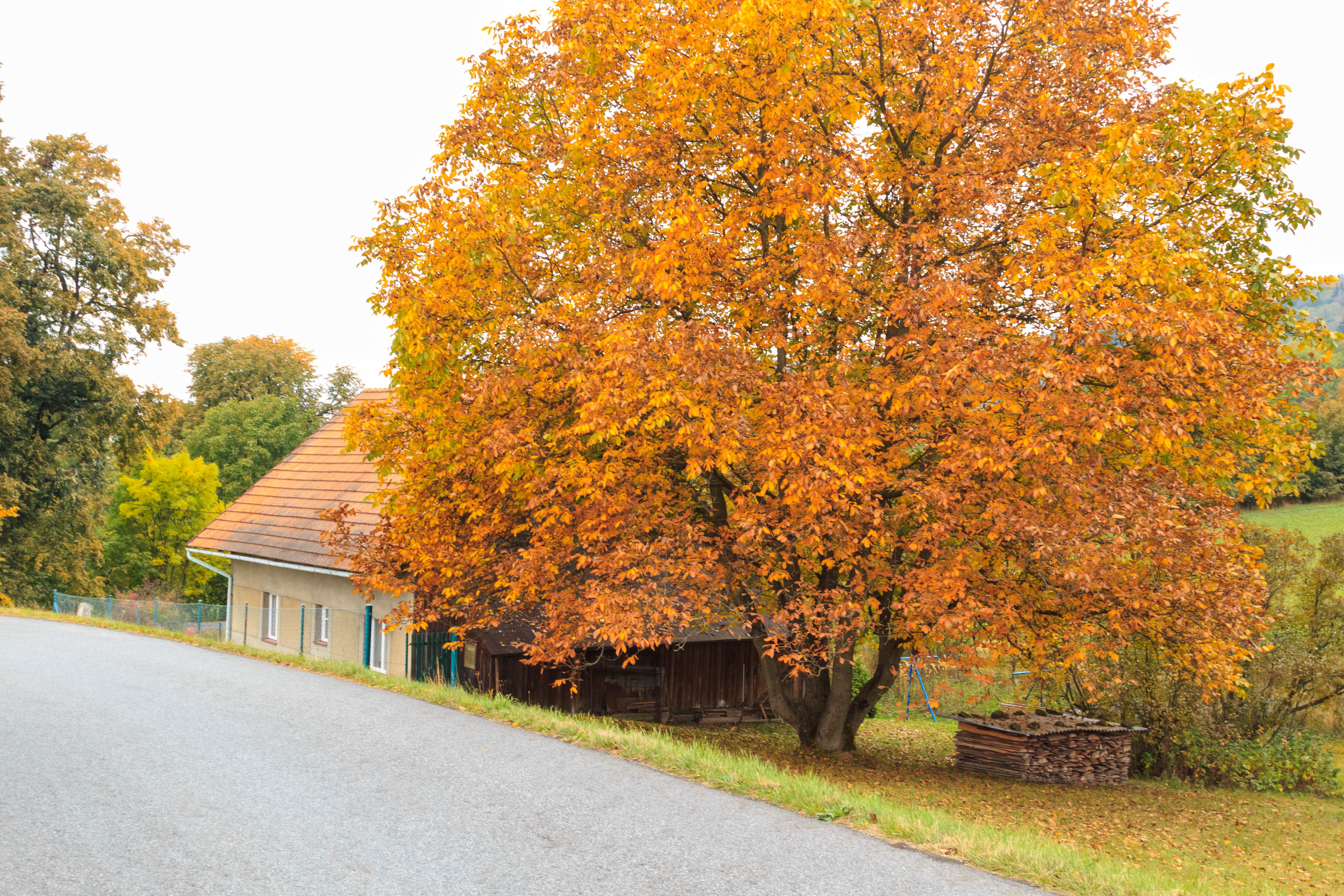 Horní Lhotka čp. 13